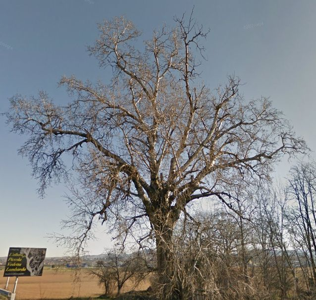 Il pioppo reale della piccola vedetta lombarda